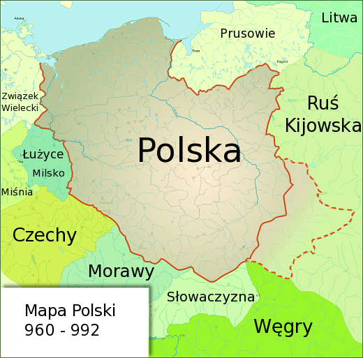 Mapa Polski w latach 960 - 992